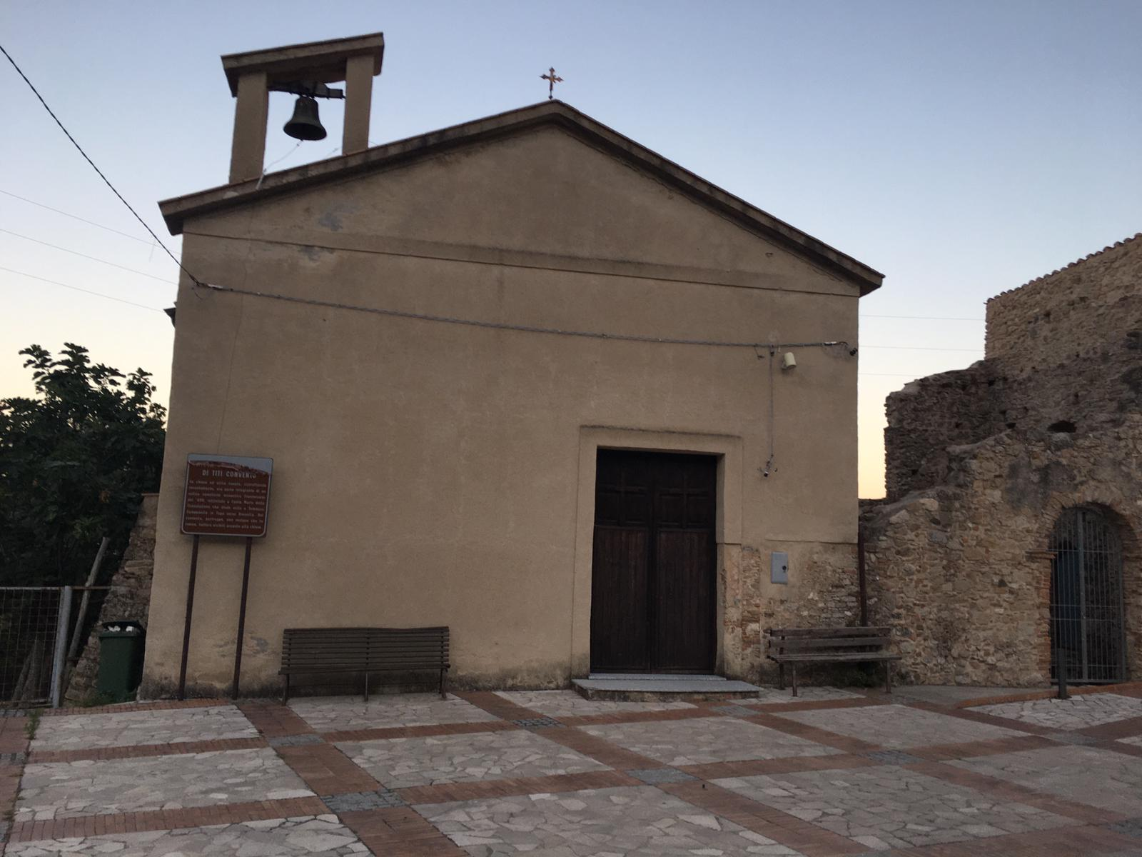 La chiesa storica di Titi